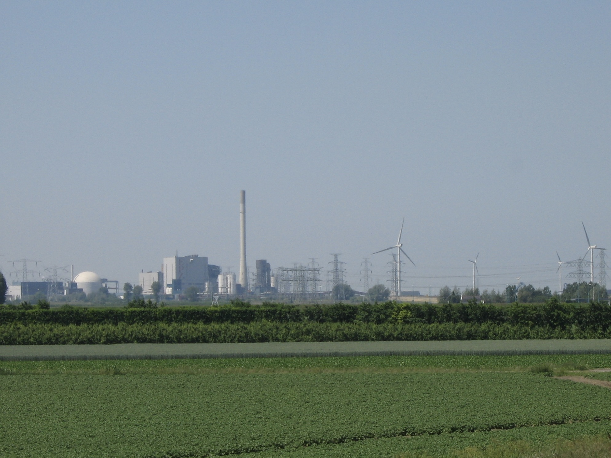 Aevegebied Vlissege-Oôst en de kerncentraole van Bossele. Havengebied Vlissinegn-Oost met de Borsselse kerncentrale. Vlissingen Seaport and Borssele nuclear power plant (only nuclear power plant in the Netherlands).